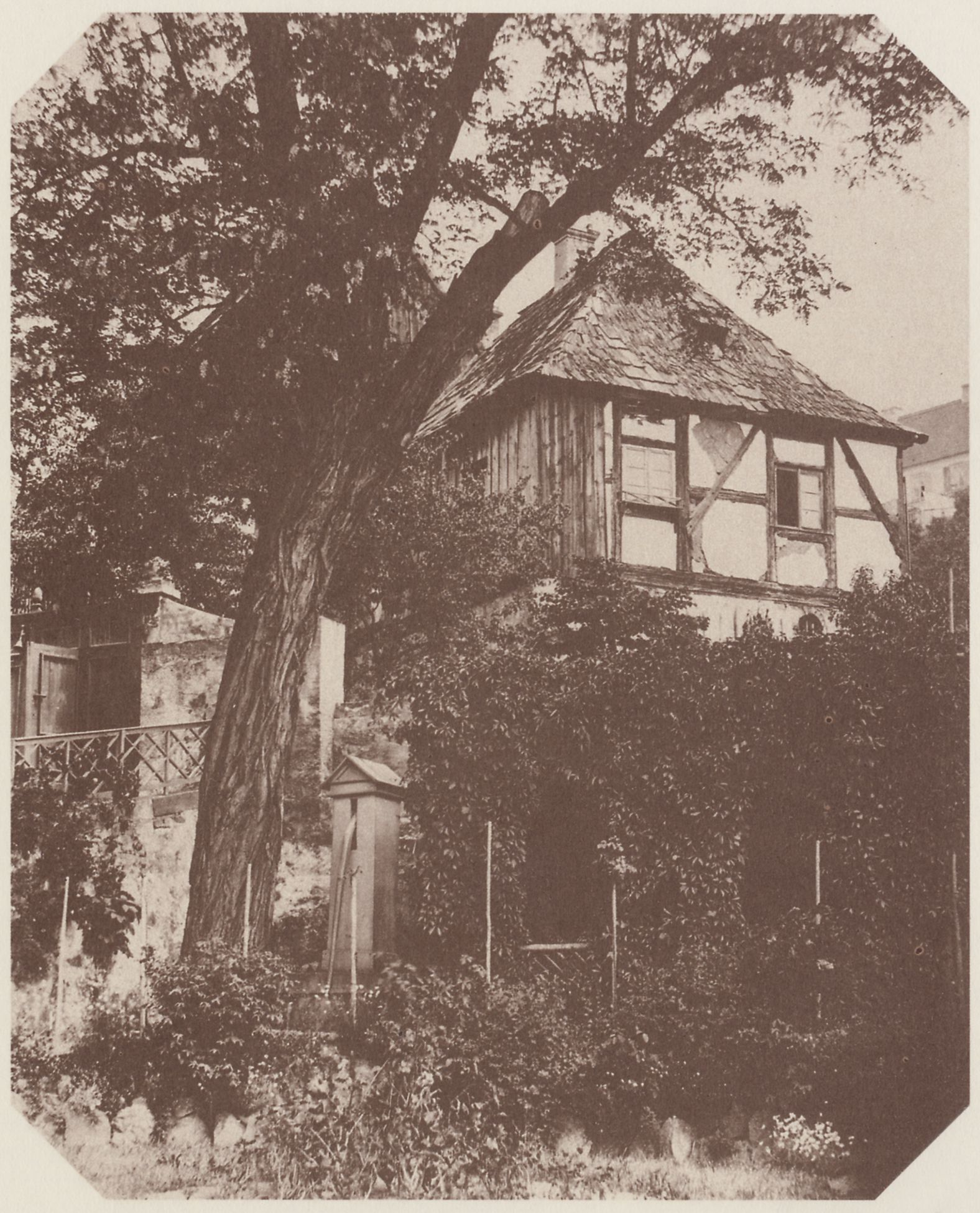 Kotzsch, Carl Friedrich August: Villa »Fallnichtein«